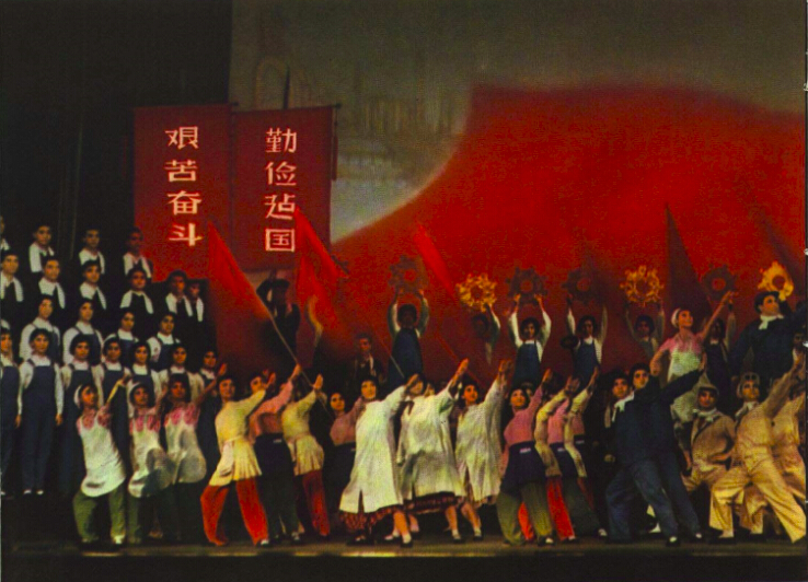 1966-08 1966年上海之春音乐会